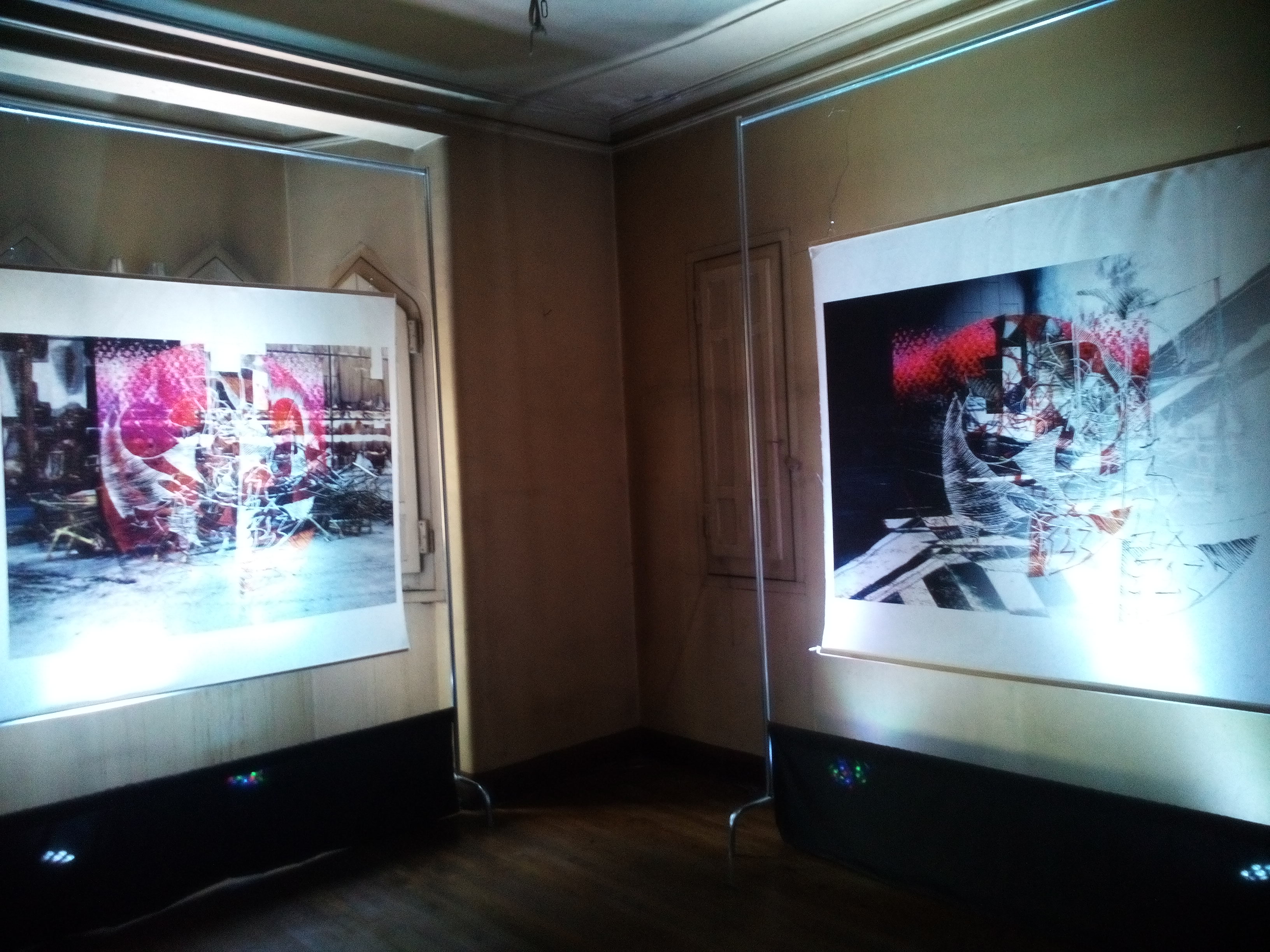 Exposición de Arte en su interior, Providencia, Santiago (Chile)